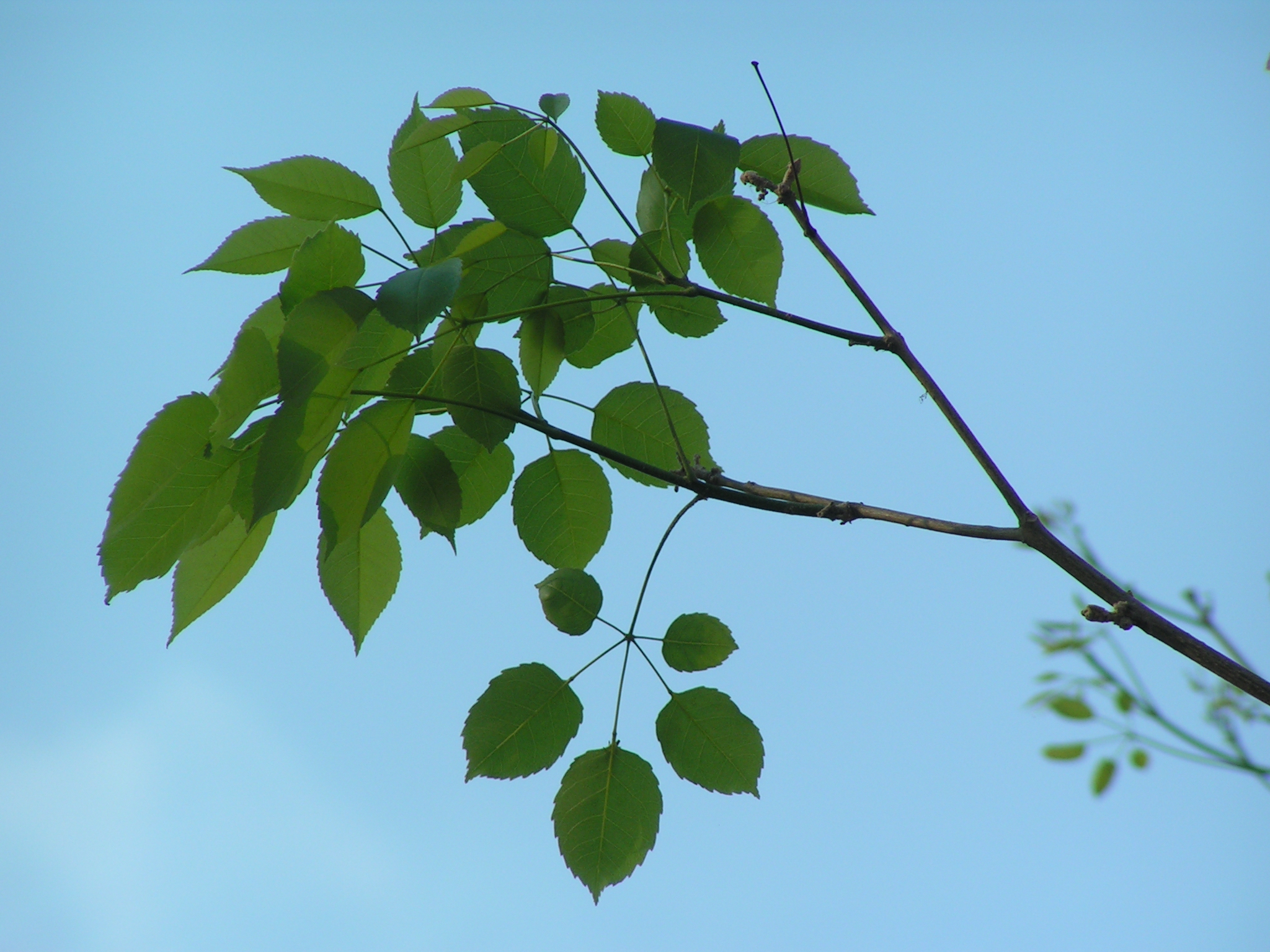 Hojas de Lapacho rosado (Tabebuia impetiginosa)